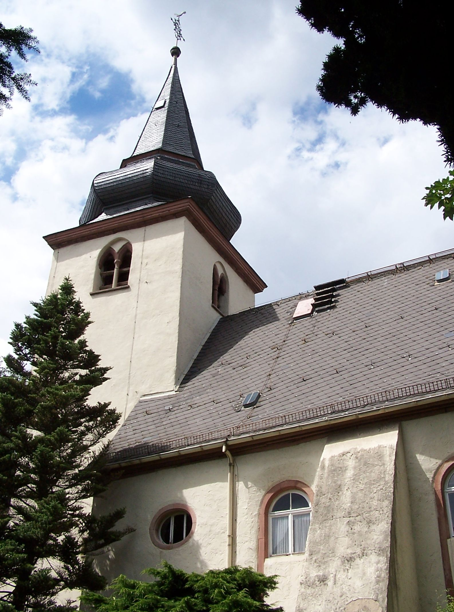 Ehemalige Evangelisch-Reformierte Kirche Ober-Eschbach (jetzt Stadtteil von Bad Homburg vor der Höhe). Turm und Schiff frühgotisch. Turmhelm und Chor barock. 1823 profaniert. Bis 1972 Bürgermeisteramt.